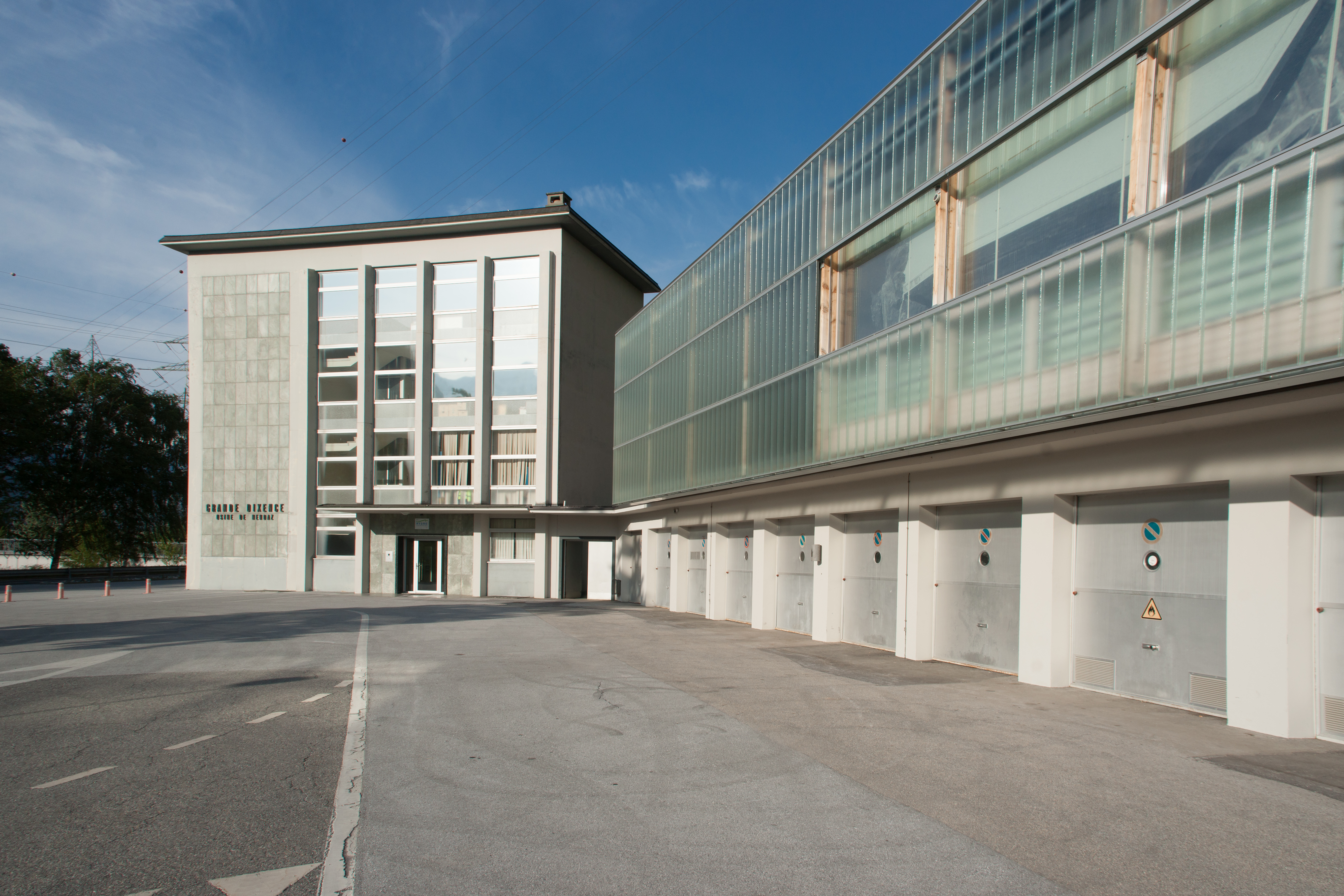 Usine hydroélectrique de Nendaz, située sur la commune de Riddes en Valais (Suisse). Il s'agit d'une usine faisant partie de la Grande Dixence.